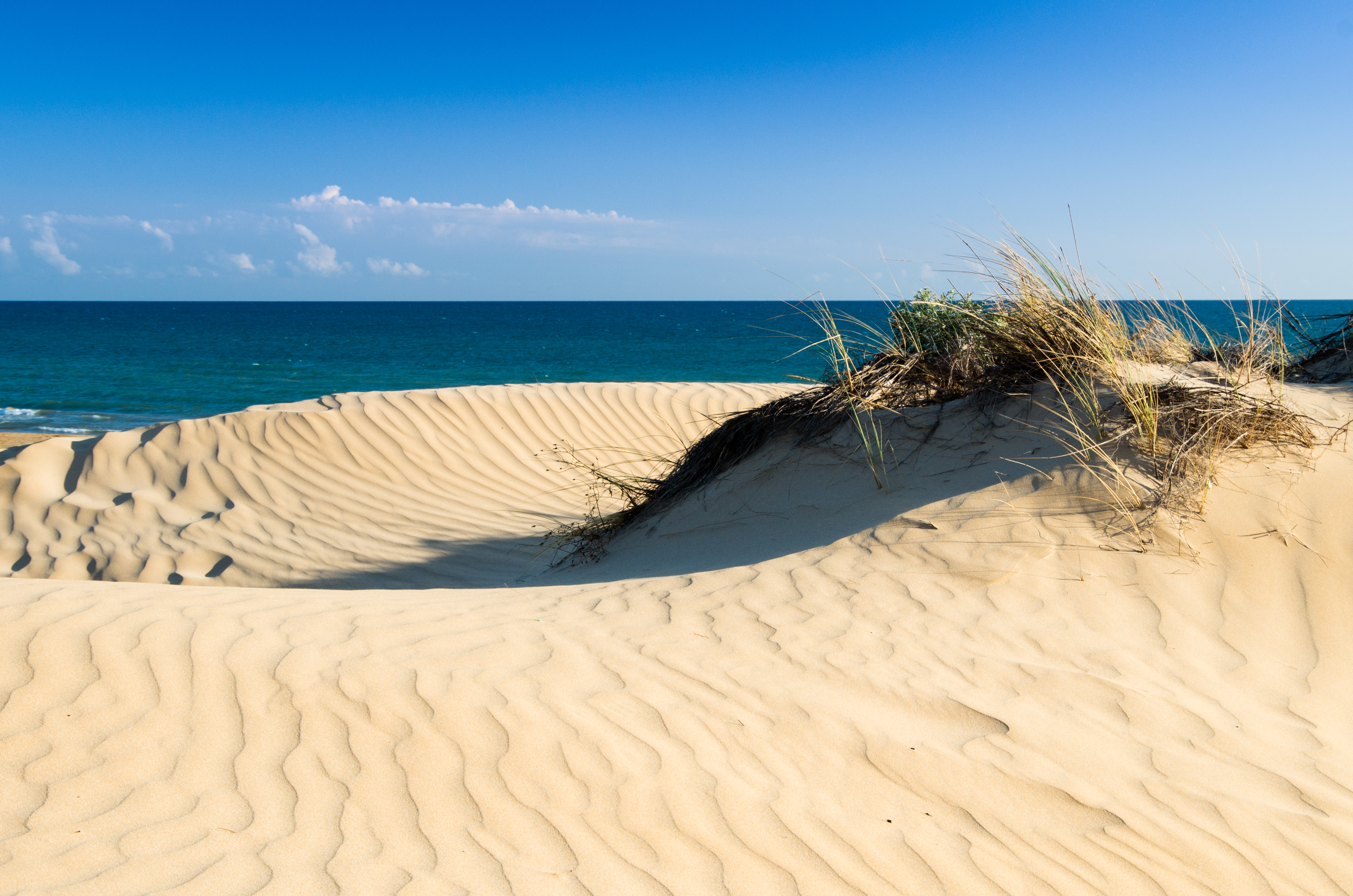 _IMG2158